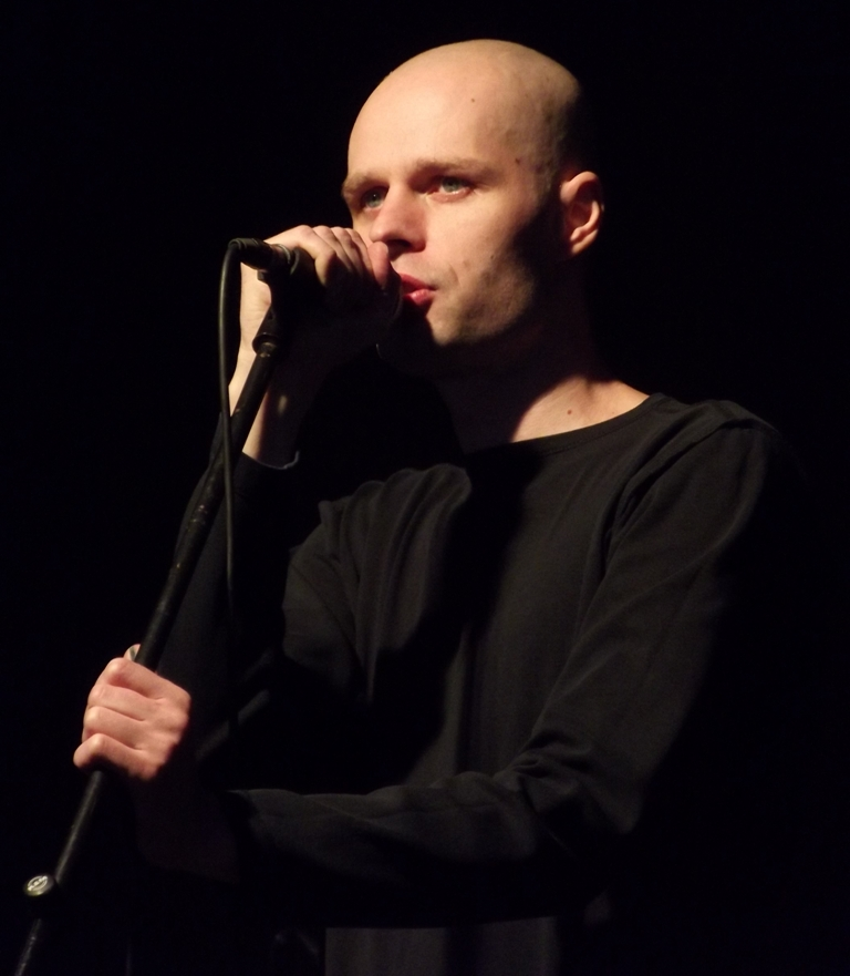 Zdjęcie zrobione podczas 8. edycji festiwalu Tauron Nowa Muzyka, w katowickiej Dolinie Trzech Stawów.